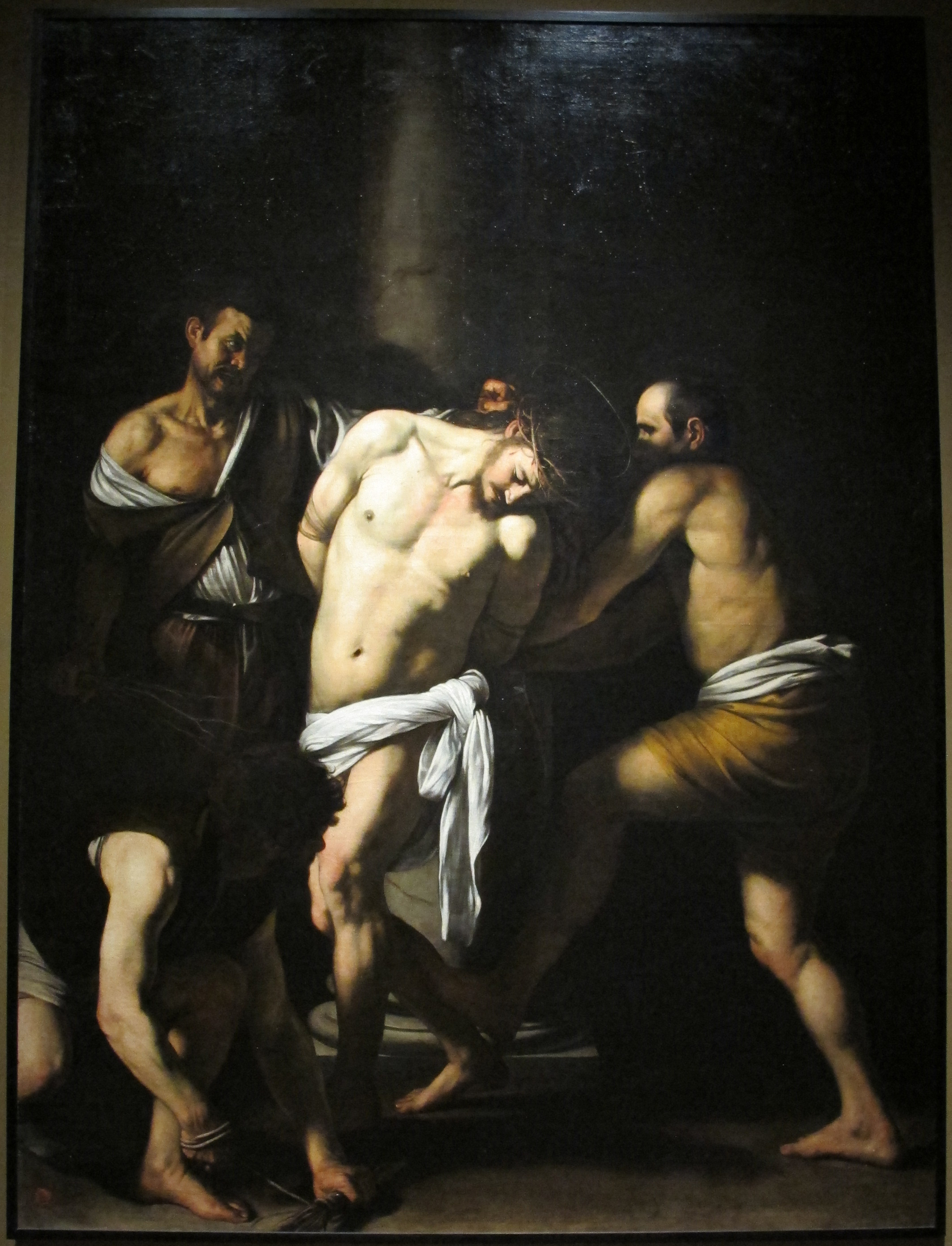 Galleria Napoletana (Museo di Capodimonte)